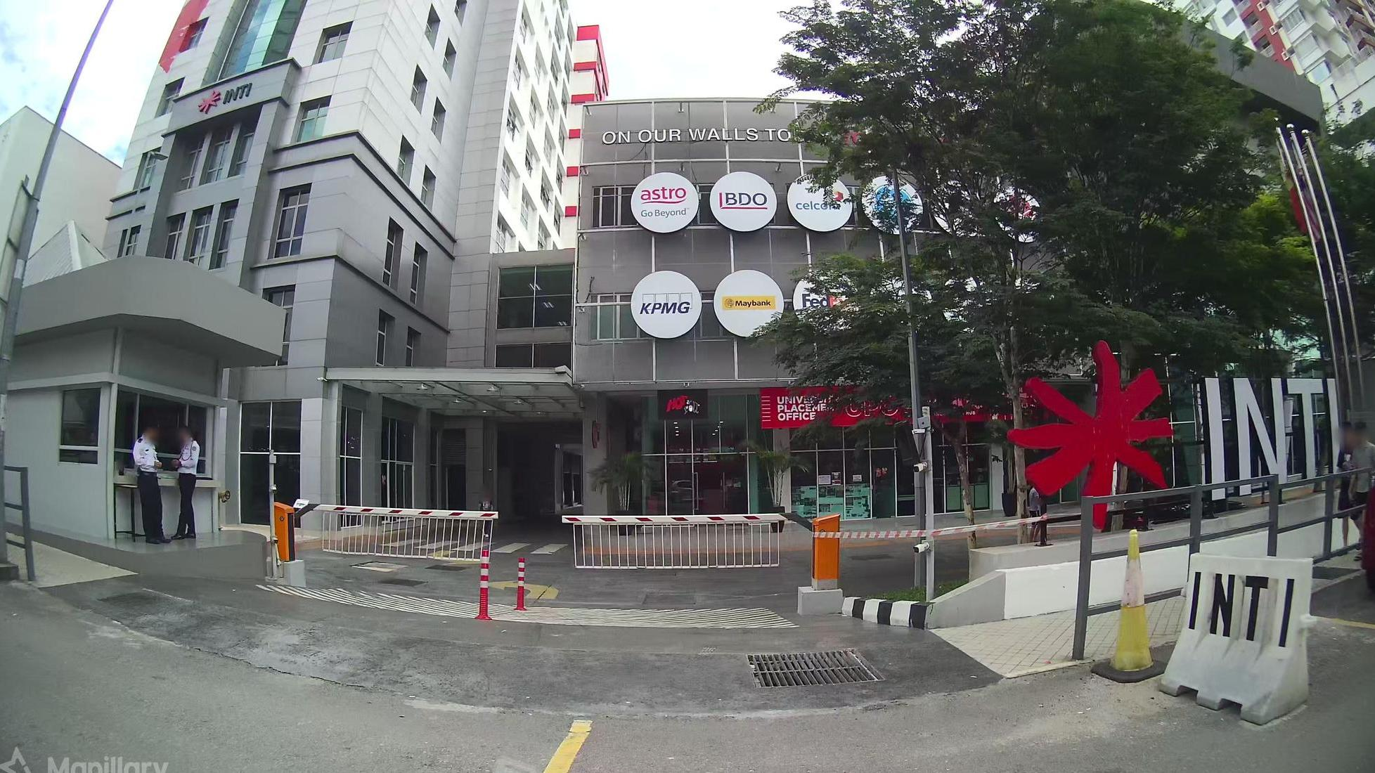 INTI Subang